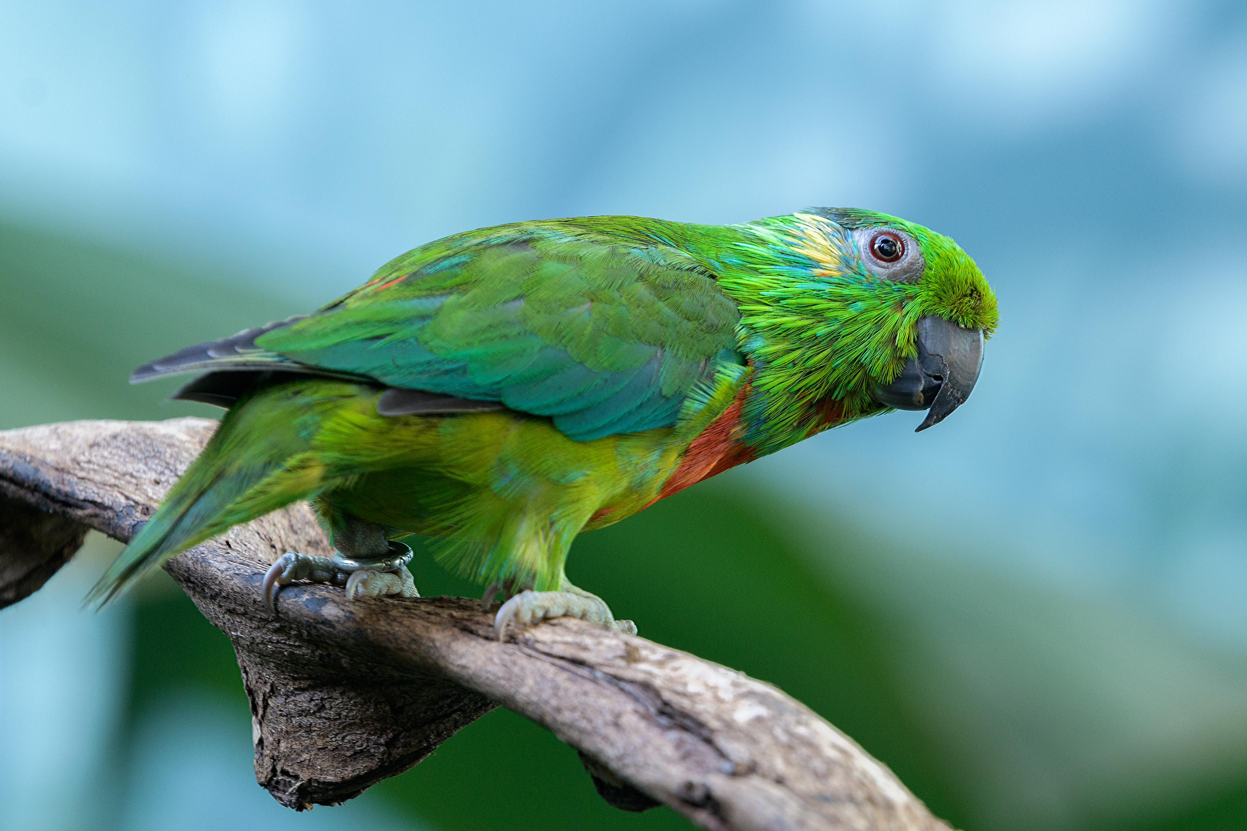 loríček zlatouchý v Zoo Praha